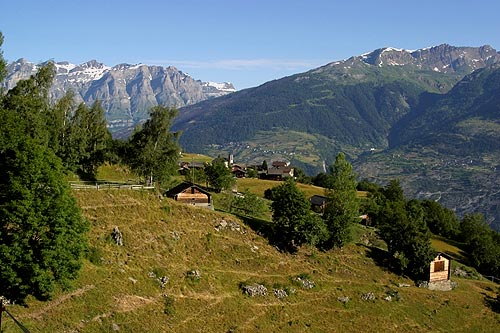 Oberems (Turtmanntal)